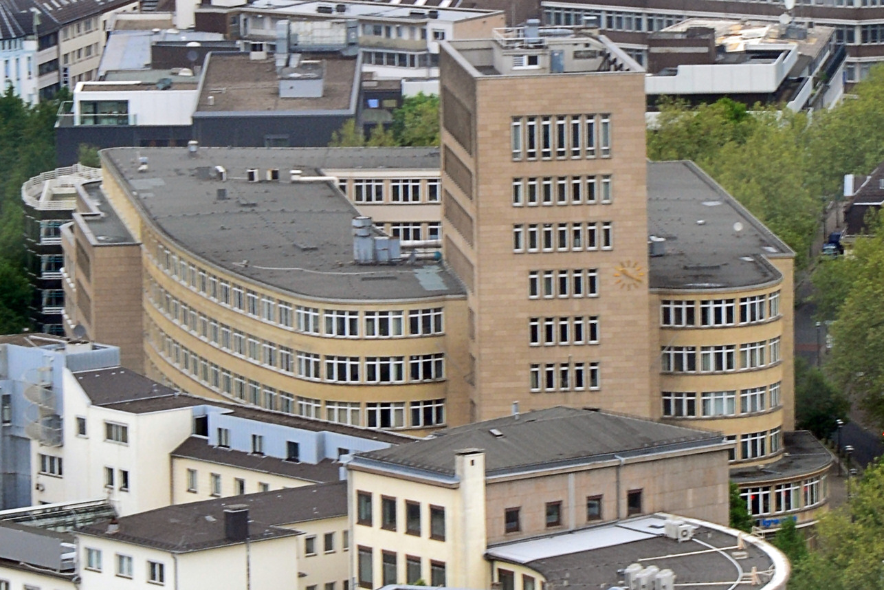 Deutschlandhaus im Essener Stadtkern, Architekt Jacob Koerfer, 1928